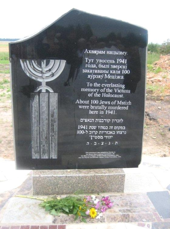 Памятник евреям деревни Мстиж Борисовского района Минской области, убитым нацистами в 1941 году. Установлен в 2007 году.